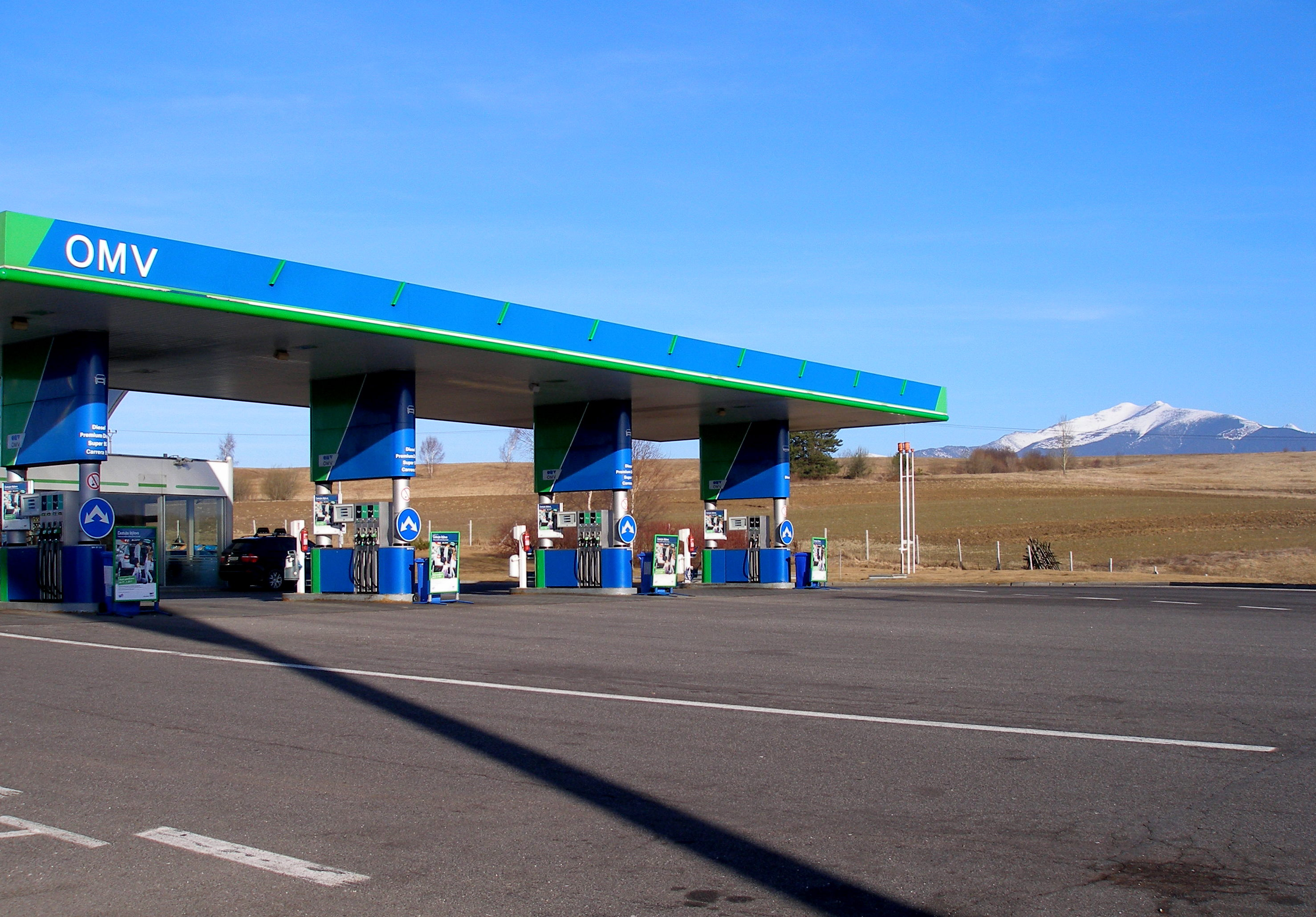 Odpočívadlo na diaľnici D1 pri obci Hybe.